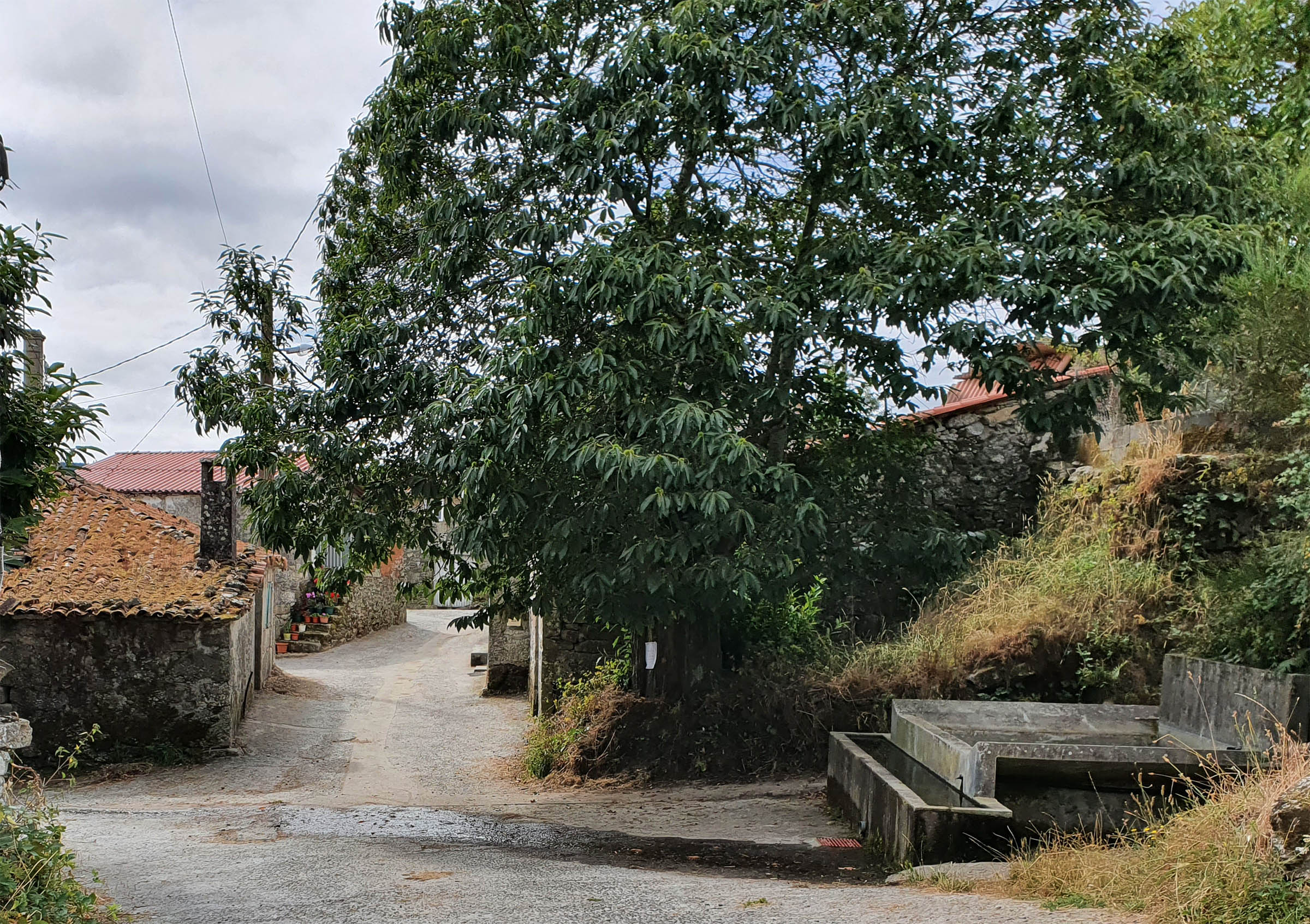 Lugar de Agüela, da parroquia de San Mamede, no Concello de Antas de Ulla.